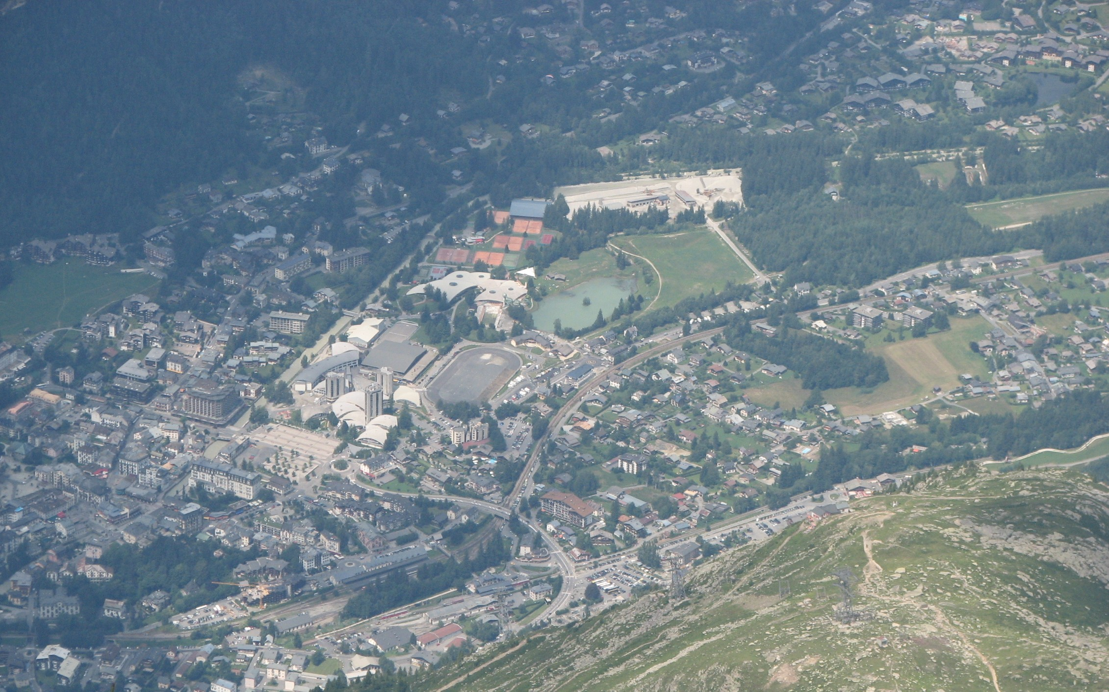 Chamonix